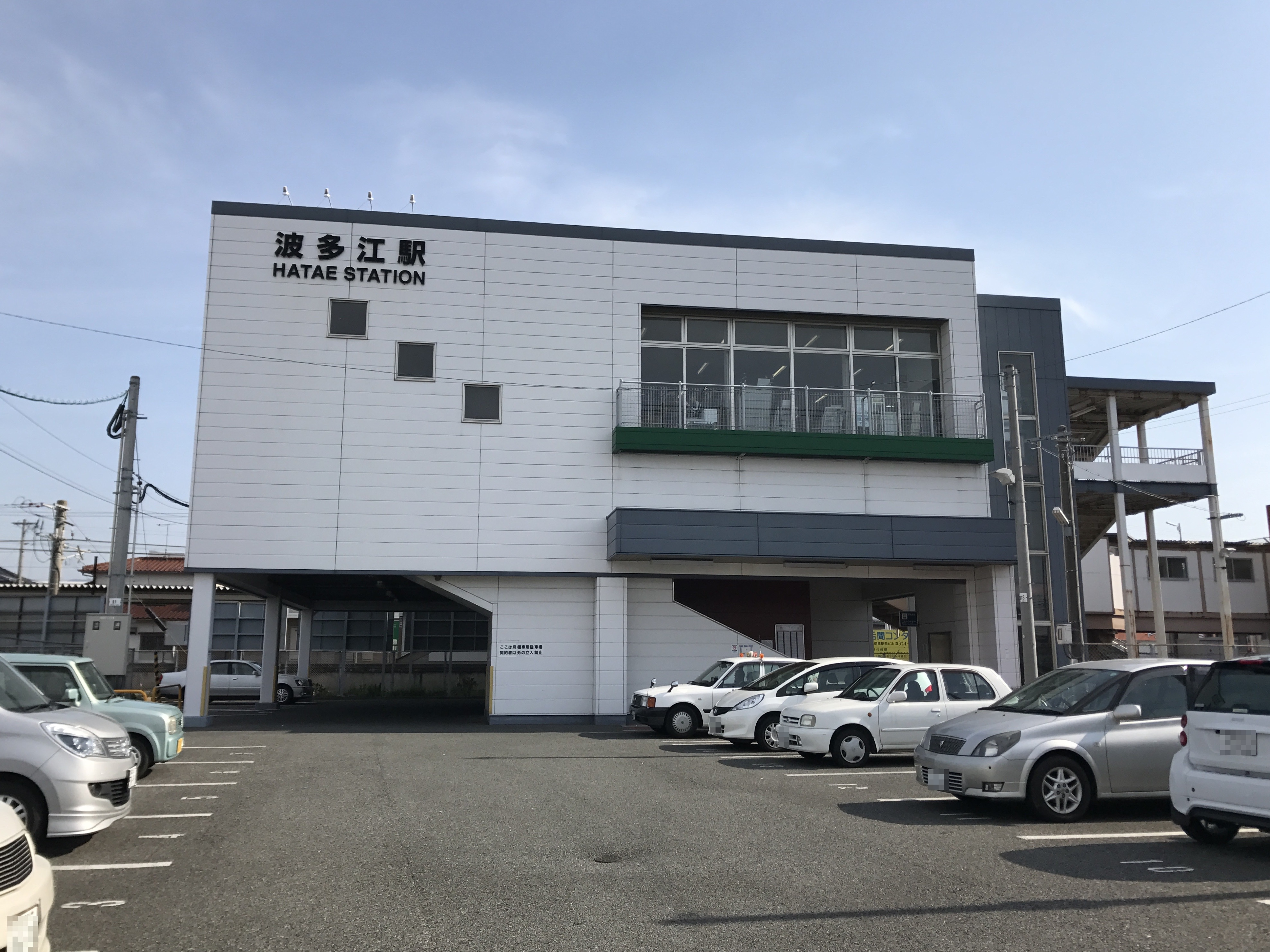 波多江駅駅舎